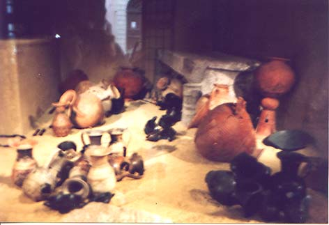 photo perso Floreal